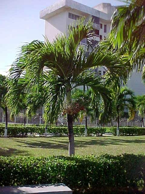 Higuerote en el estado Miranda - Venezuela